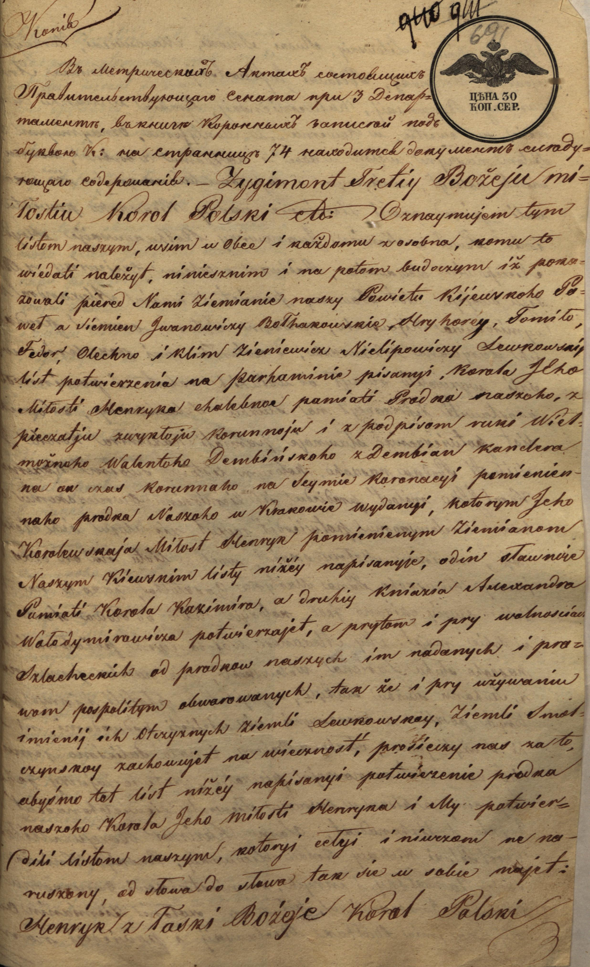 Копия от 1844 г. подтвердительной грамоты Сигизмунда III Вазы Левковским и Булгаковским от 29 сентября 1592 г.